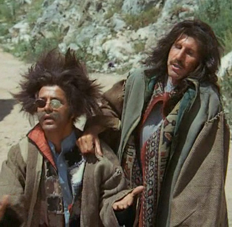 Il Gatto (Franco) e la Volpe (Ciccio) ne Le avventure di Pinocchio (1972). Fotogramma.